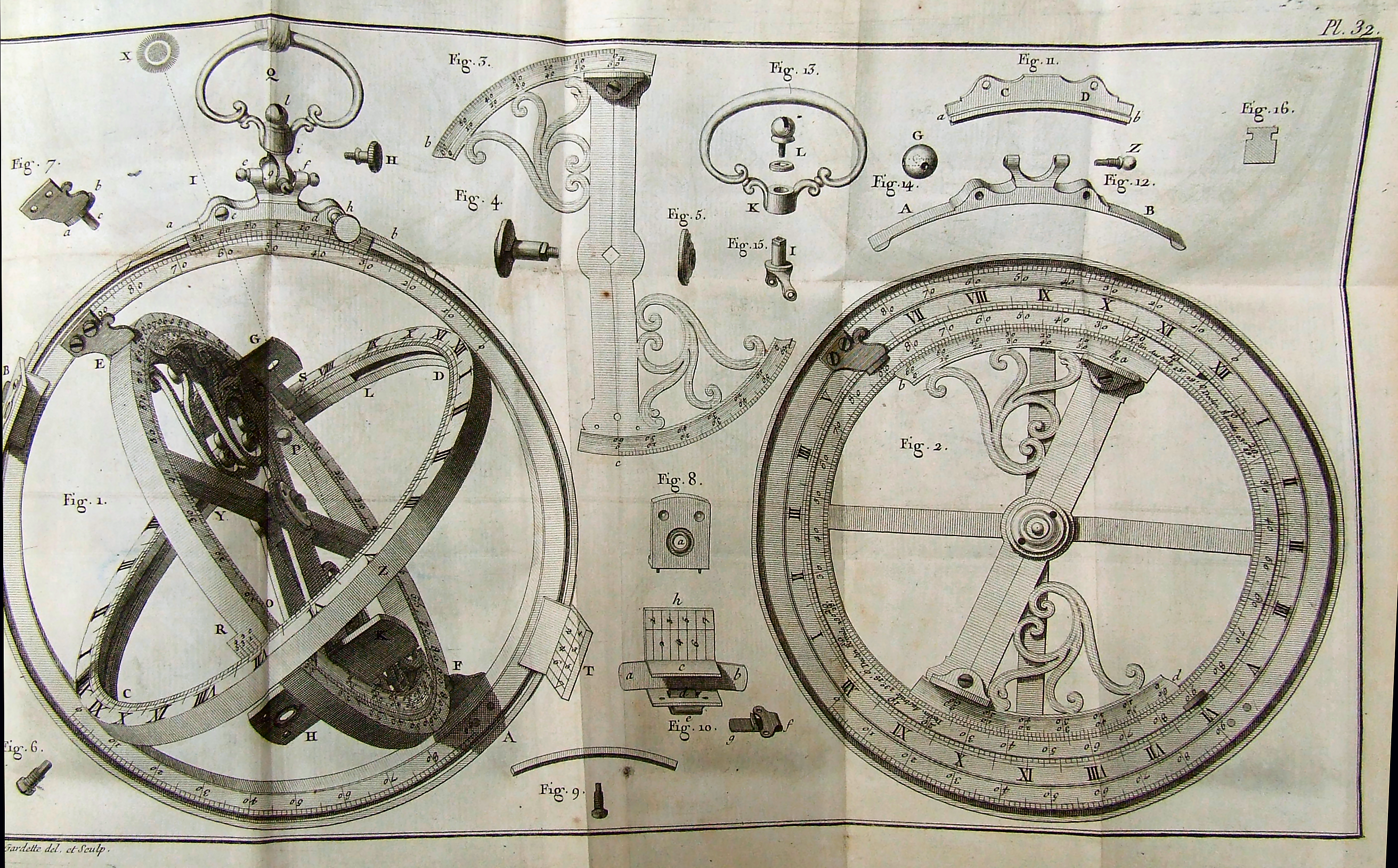 Anneau astronomique du cardinal de Luynes.